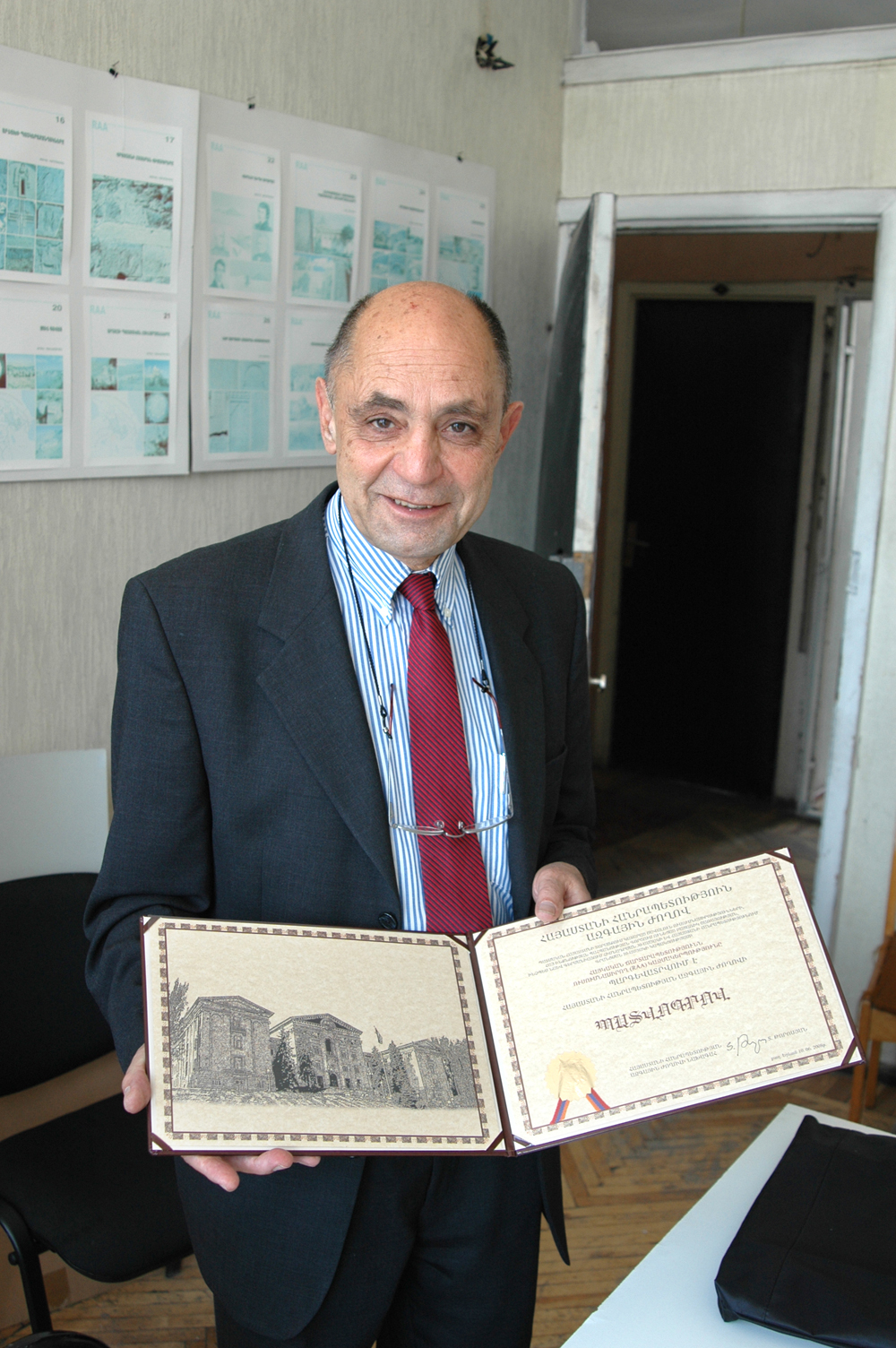 2008 Երևան